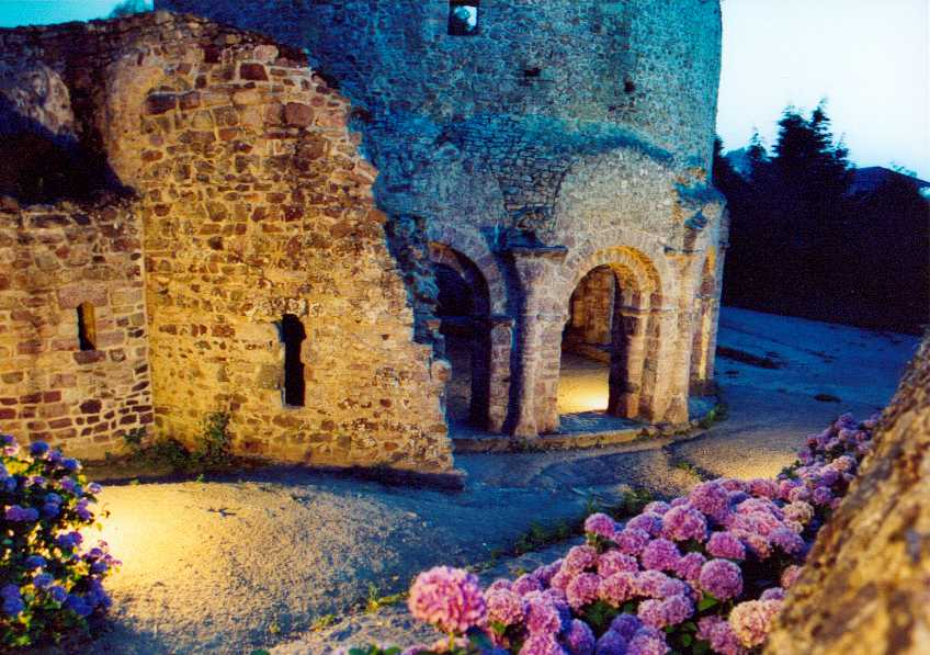 Tempel von Lanleff